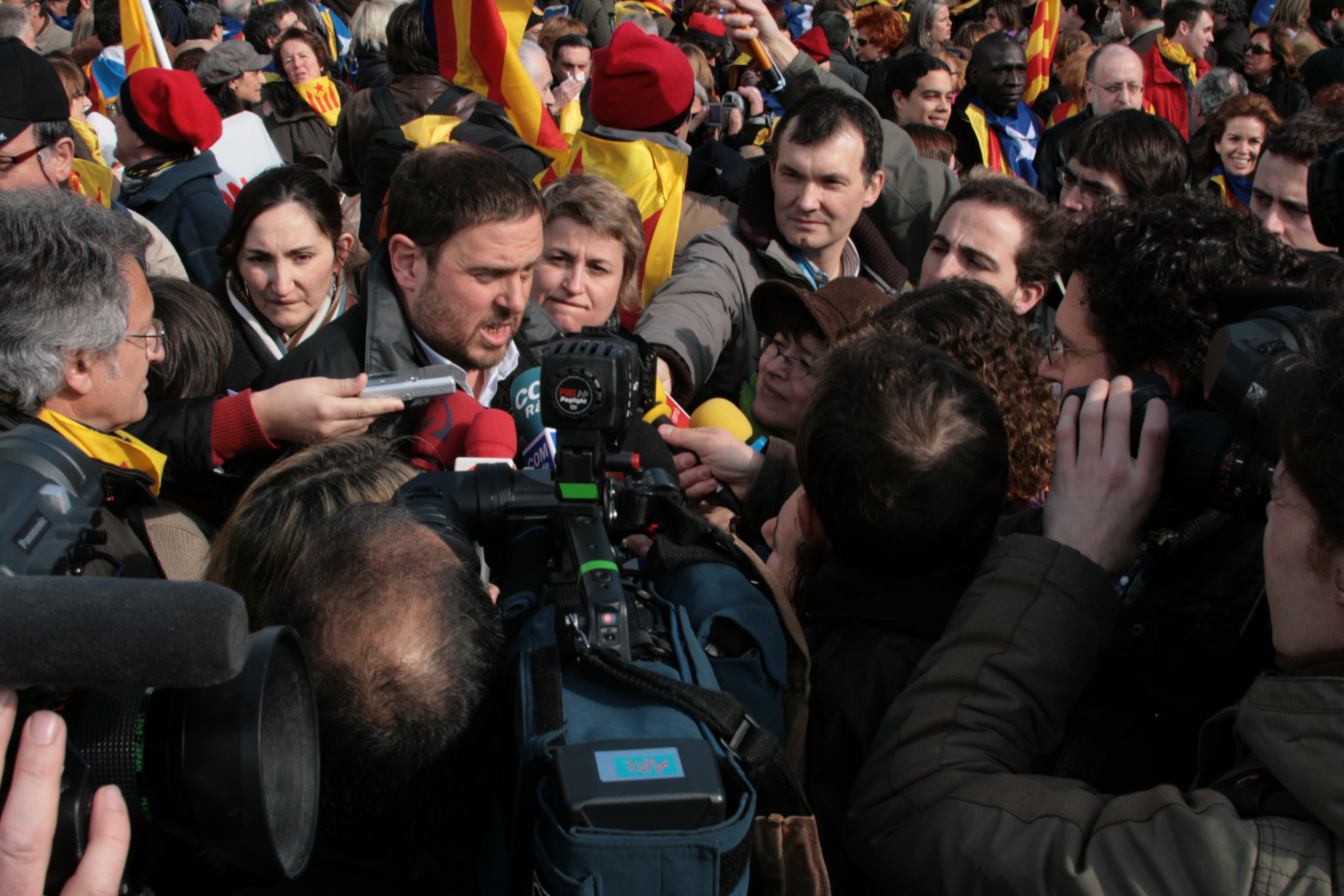 Oriol Junqueras i Vies a Brussel·les 2009